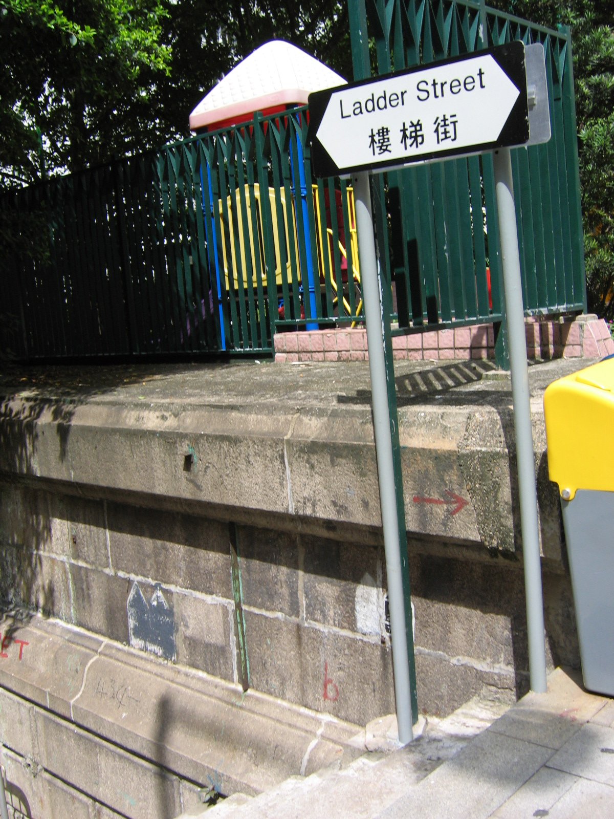 Ladder Street 樓梯街